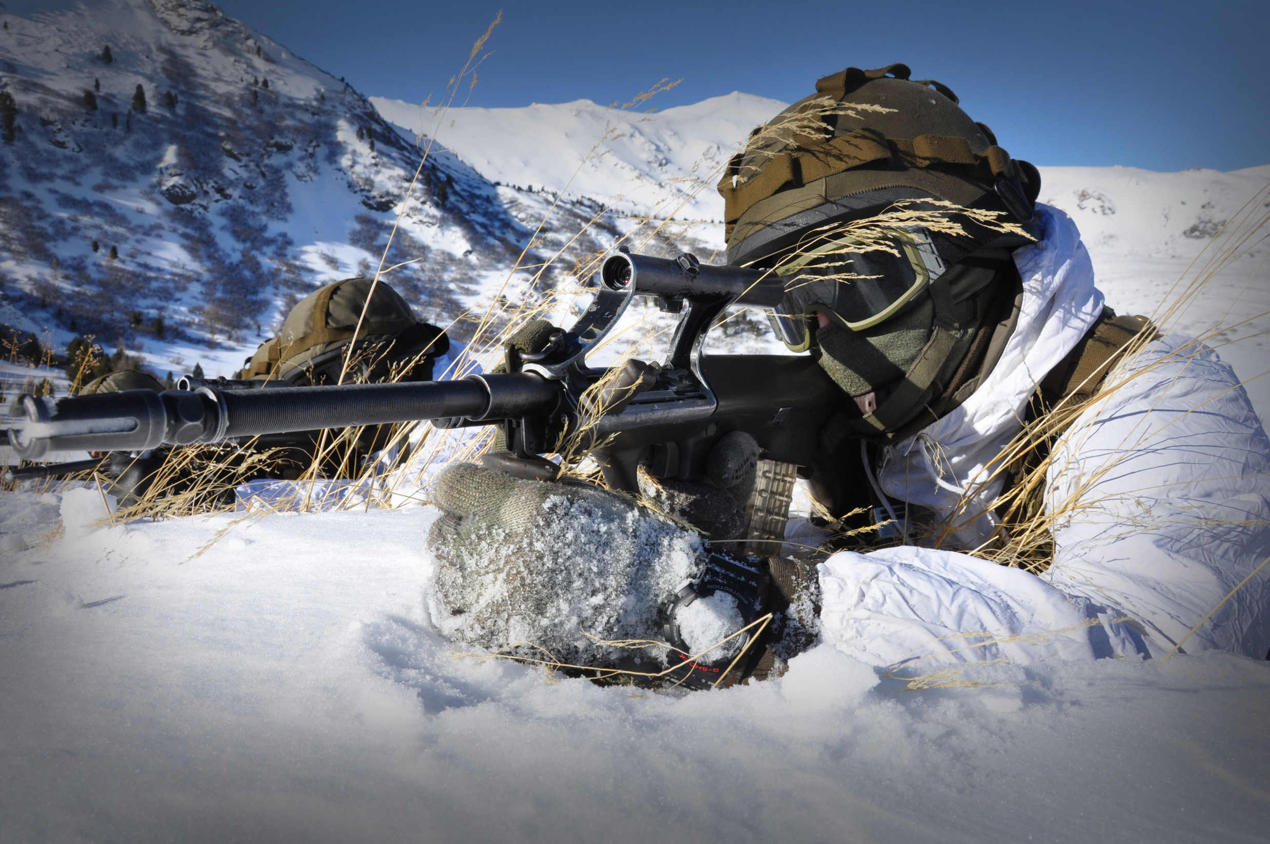 Soldaten sichern während einer Übung.